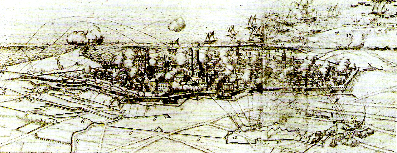 Gravado del sitio Barcelona 1714